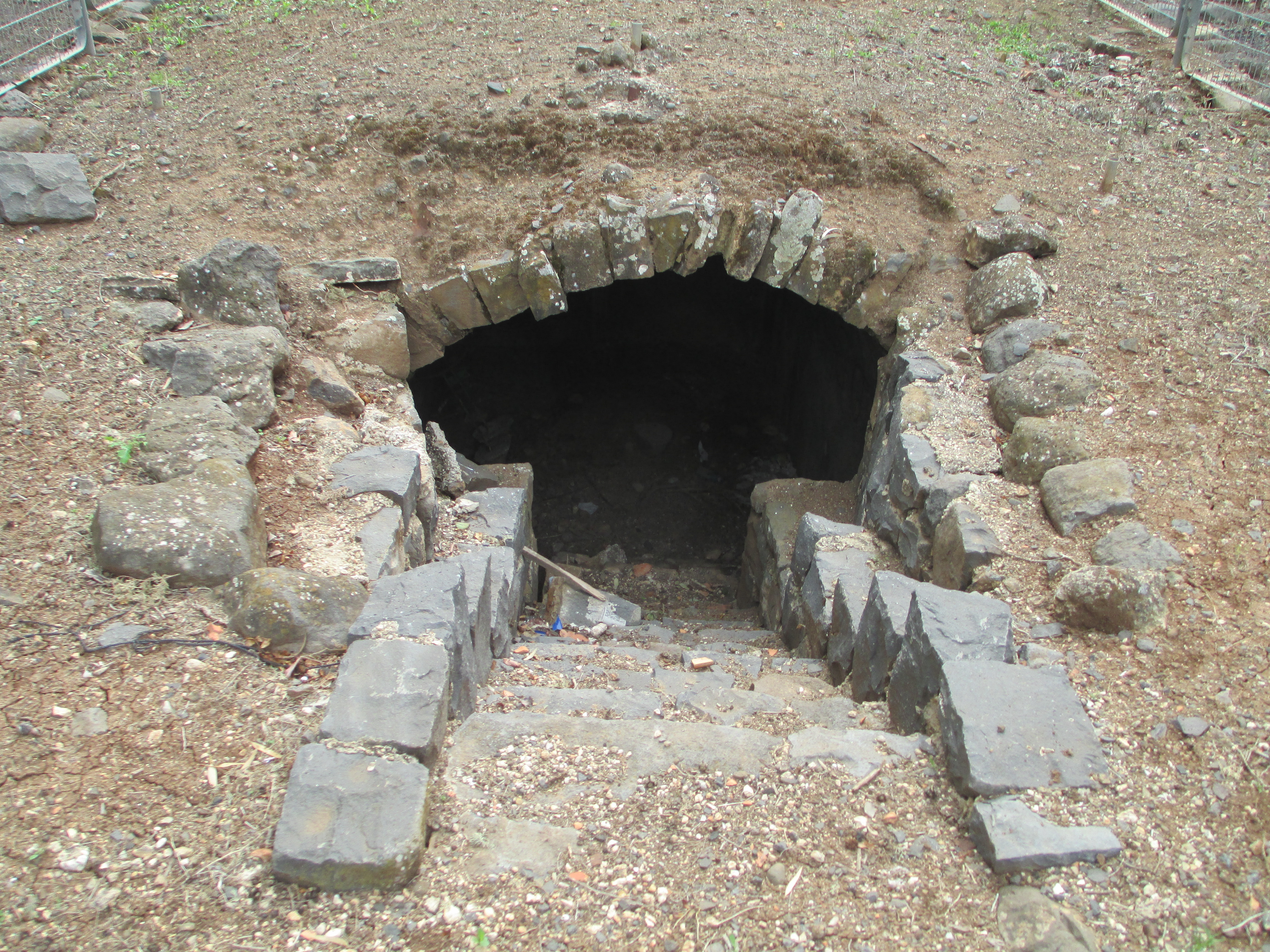 המרתף בו התבצרו אחרוני המגינים במושבה משמר הירדן